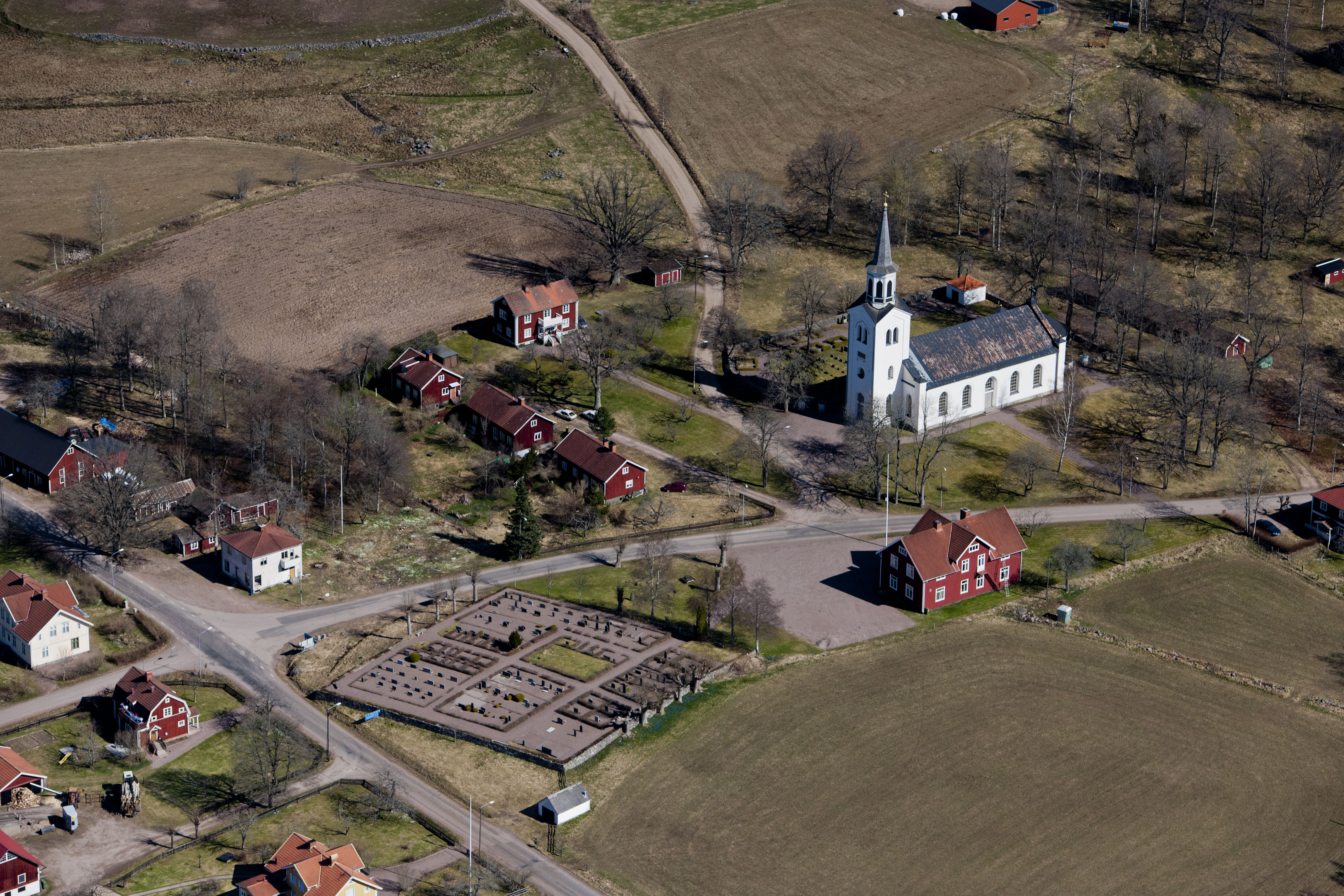 Svinhults ka